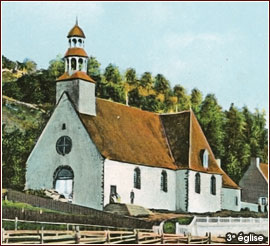 Troisième et dernière église de Sainte-Anne-de-Beaupré avant l'inauguration de la première basilique en 1876